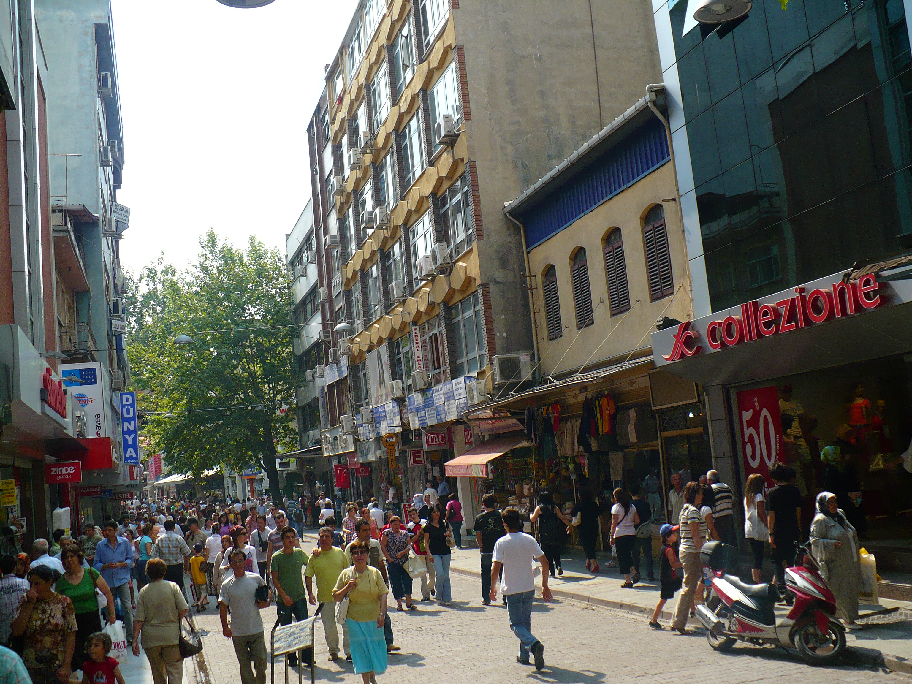 İzmit'ten görüntüler